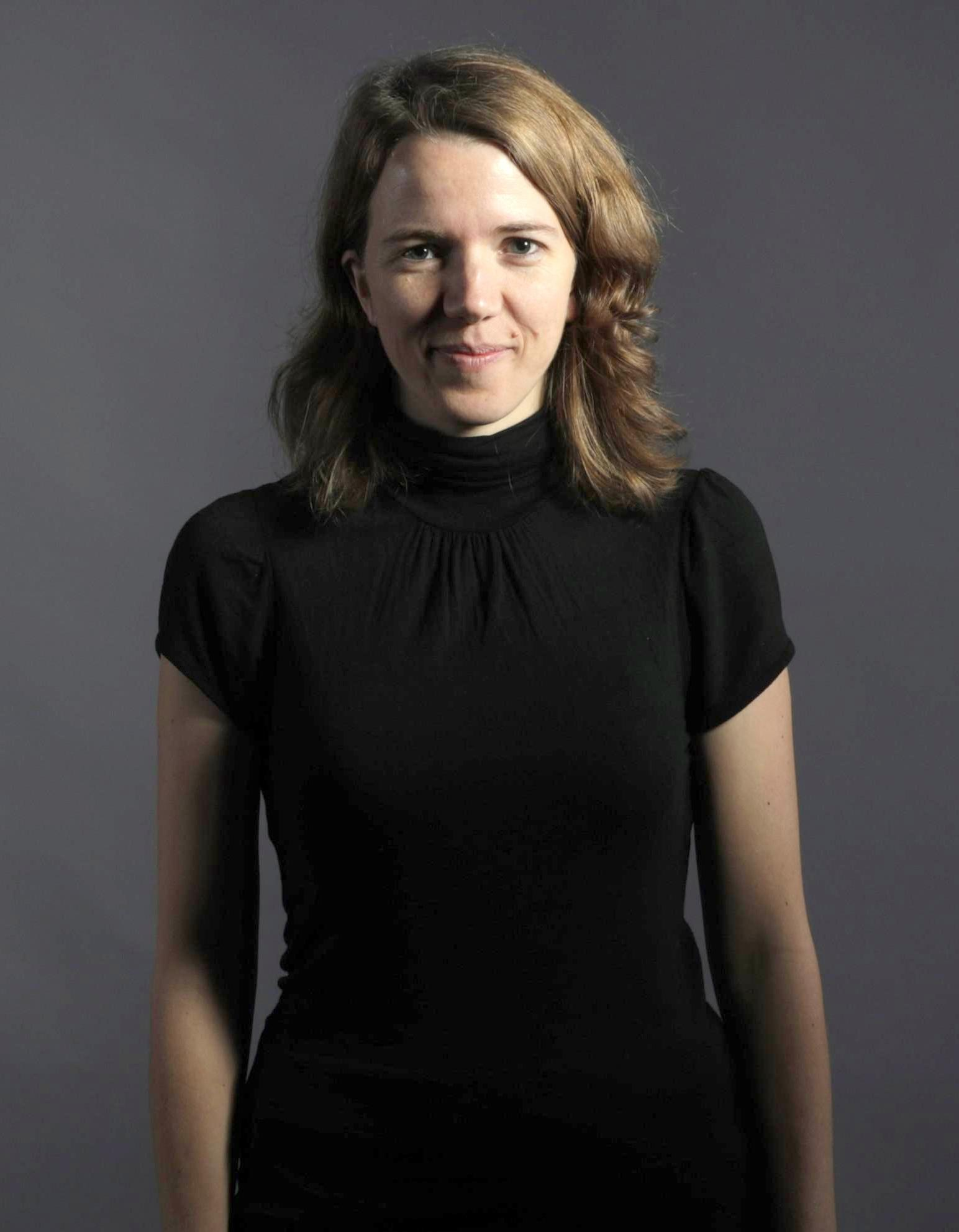 El Pabellón de los Jardines de Cecilio Rodríguez, en el Parque de El Retiro, ha sido el escenario para la presentación de las nuevas direcciones de seis grandes centros culturales municipales. La alcaldesa de Madrid, Manuela Carmena, les ha dado la bienvenida a la ciudad. La música del productor y músico Suso Saiz, y las palabras del novelista y poeta Benjamín Prado, les han acompañado en este encuentro.